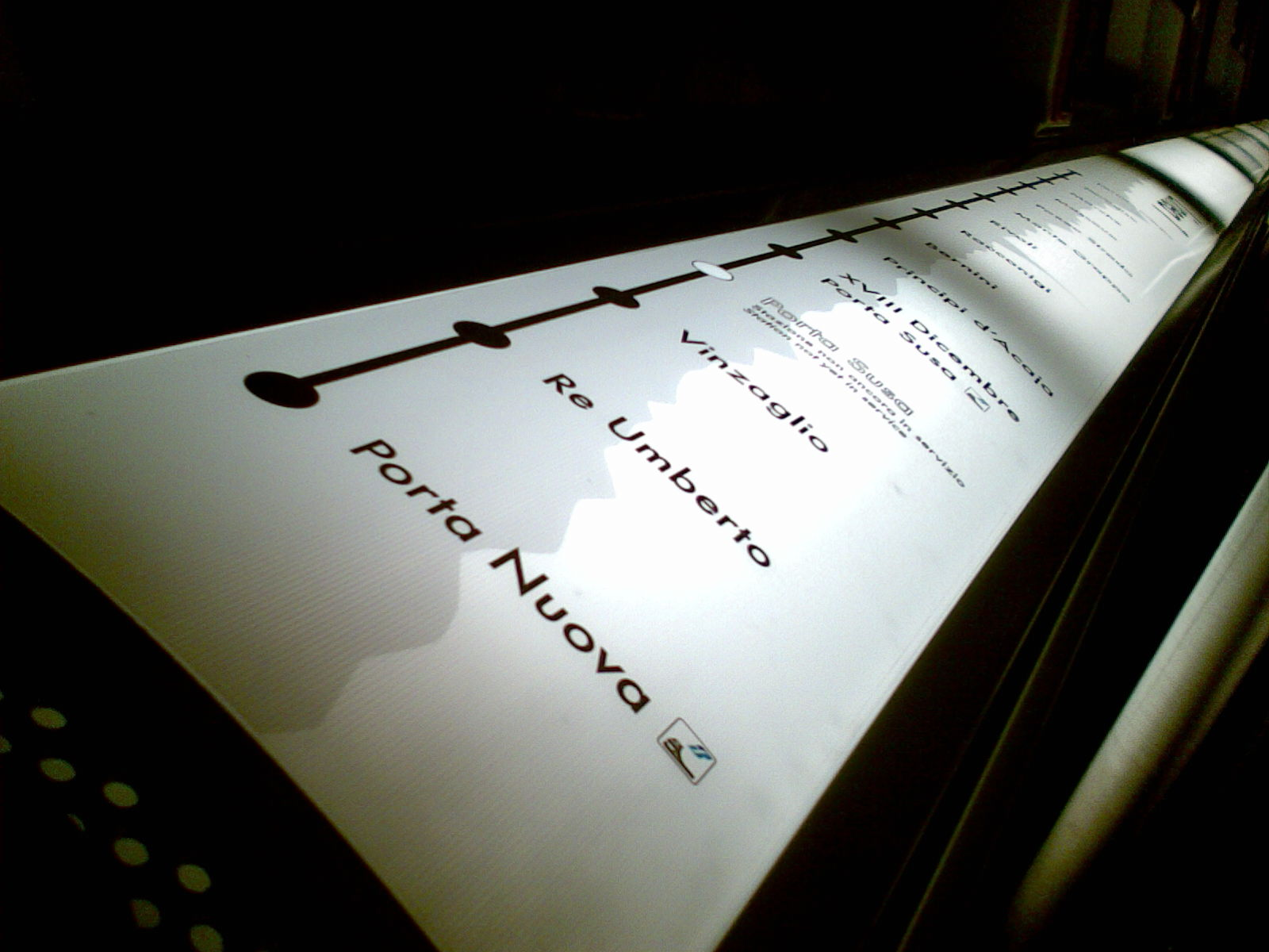 Fermate della linea 1 della metropolitana di Torino, cartello interno ad un convoglio.